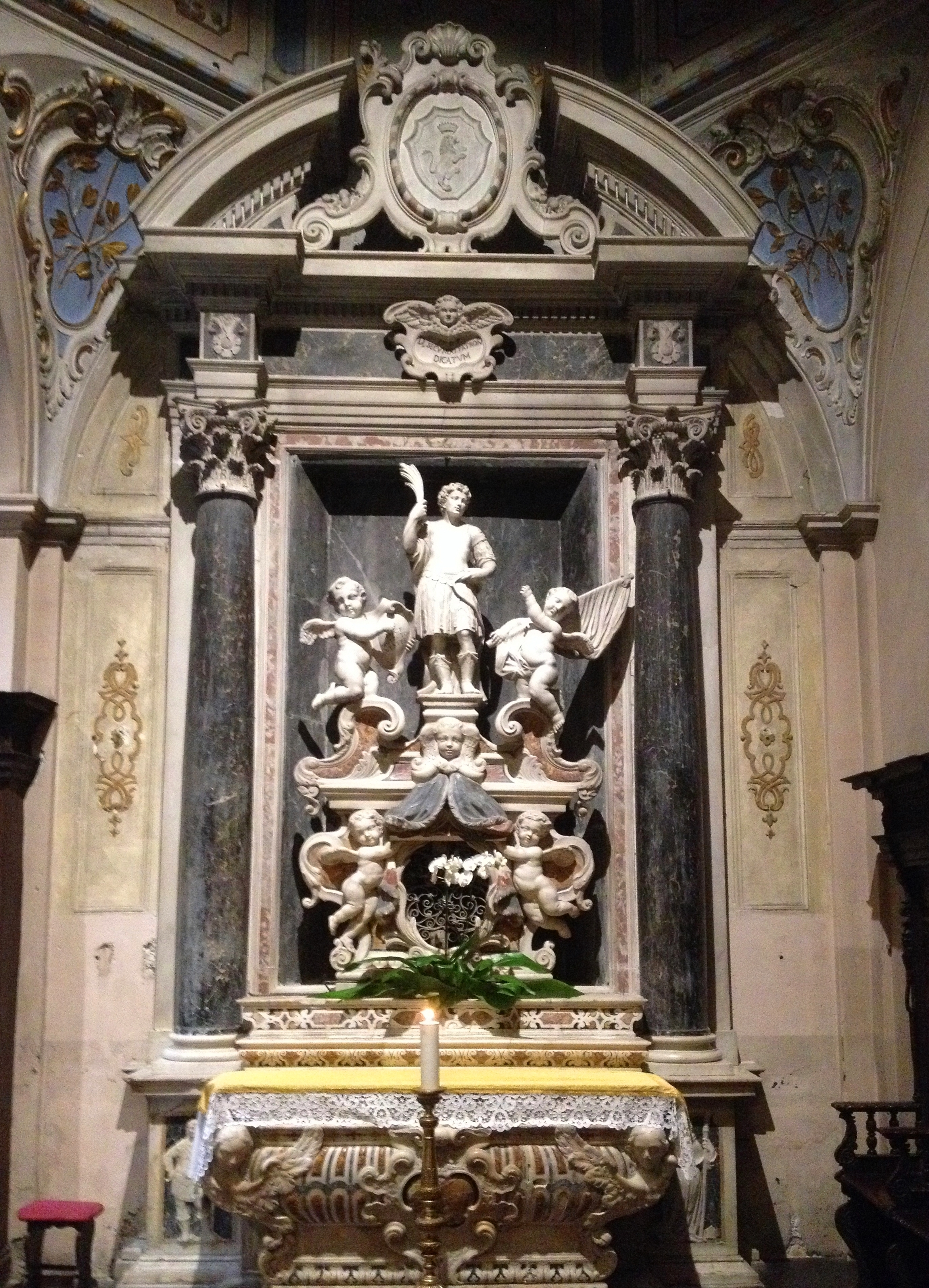 Cattedrale di Ventimiglia, altare di San Secondo